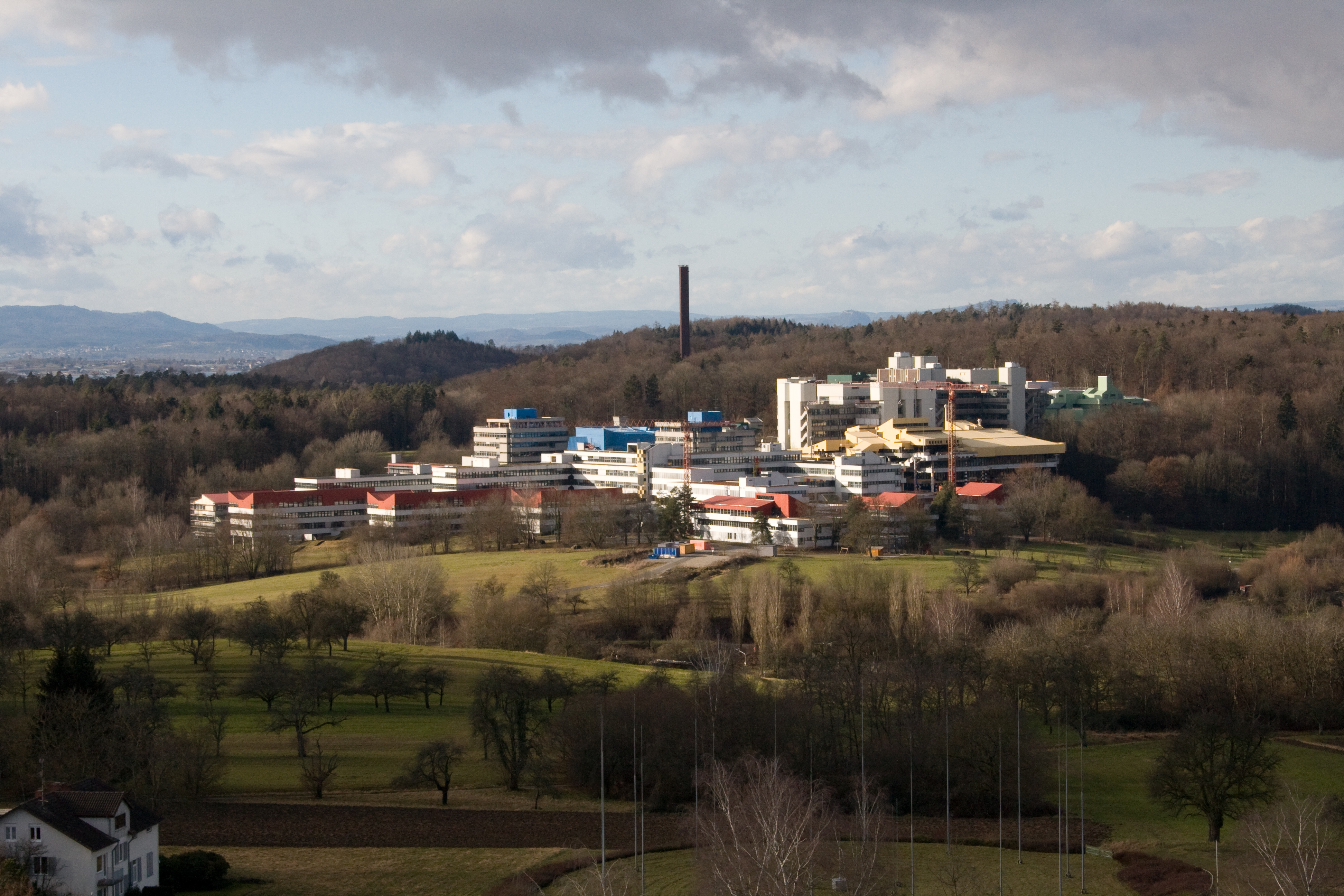 Die Gebäude der Universität Konstanz.